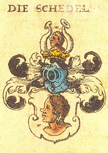 Wappen der Nürnberger ehrbaren Familie Schedel